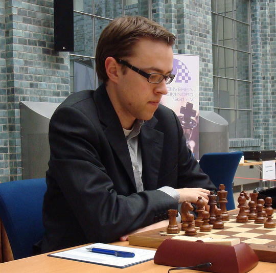 IM Jan Michael Sprenger Germany, Schachbundesliga 2008